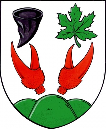 znak, Černá, okres Žďár nad Sázavou